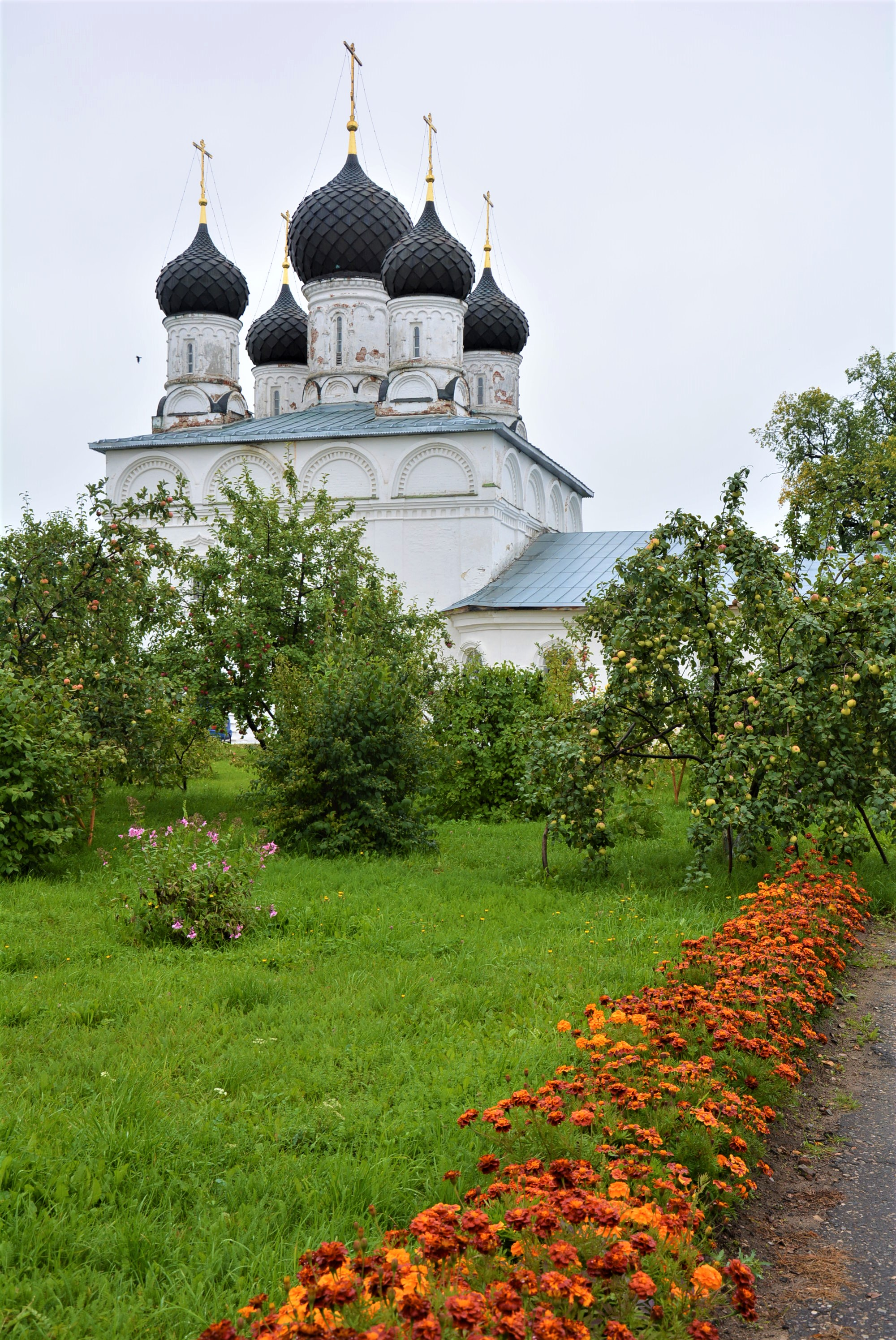 Церковь Макария Унженского: центр, Макарьев, Макарьевский район, Костромская область